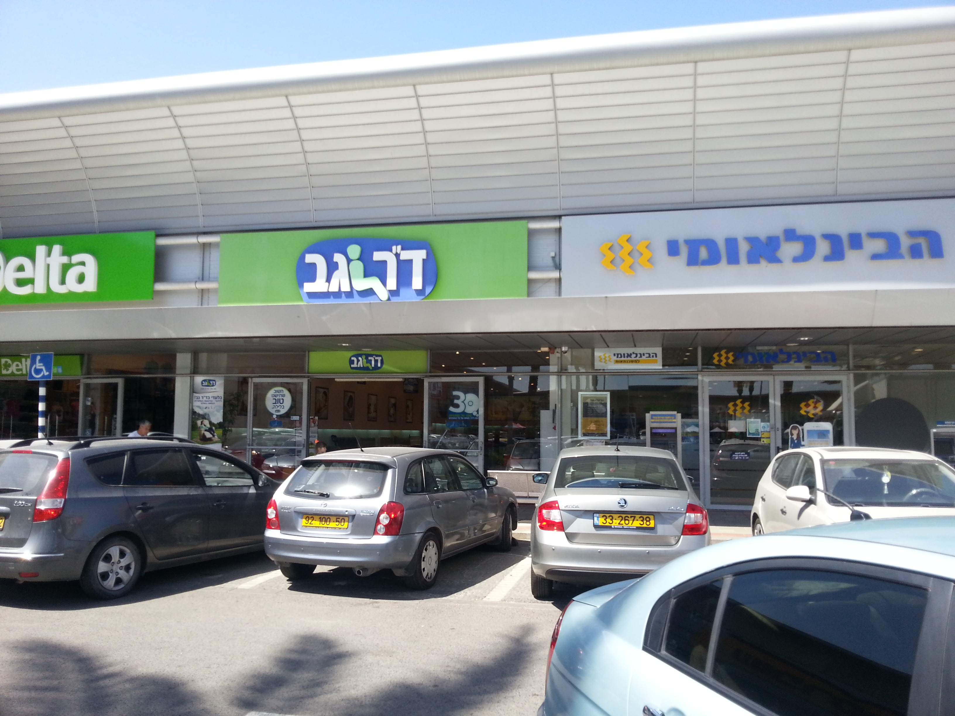 סניף יקנעם עילית